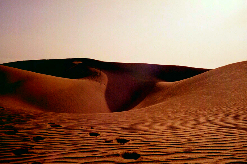 Dunes at Maspalomas